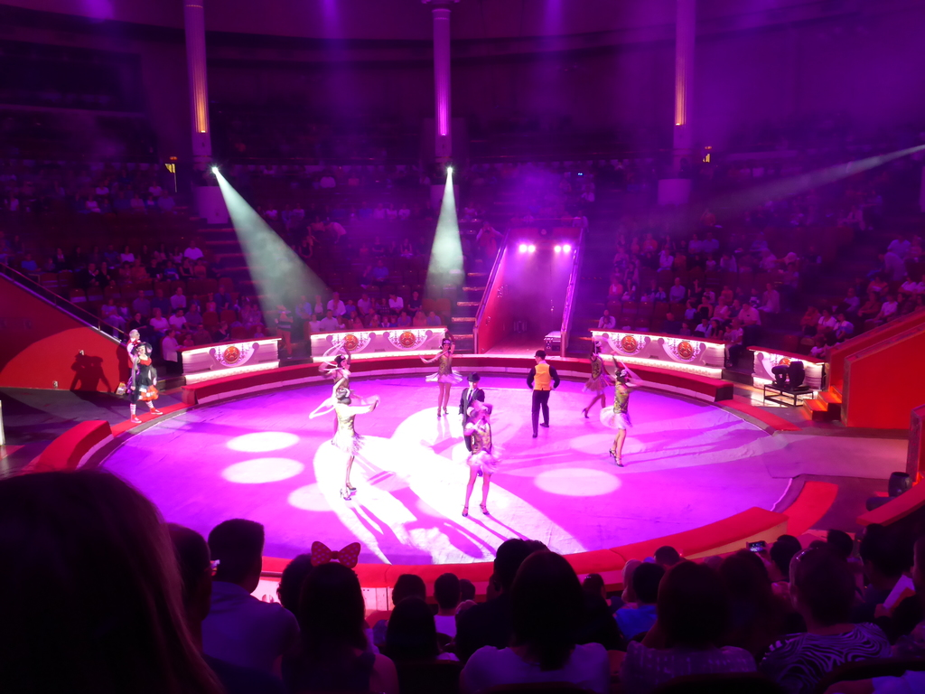 Circo Bulevar Tsvetnoi